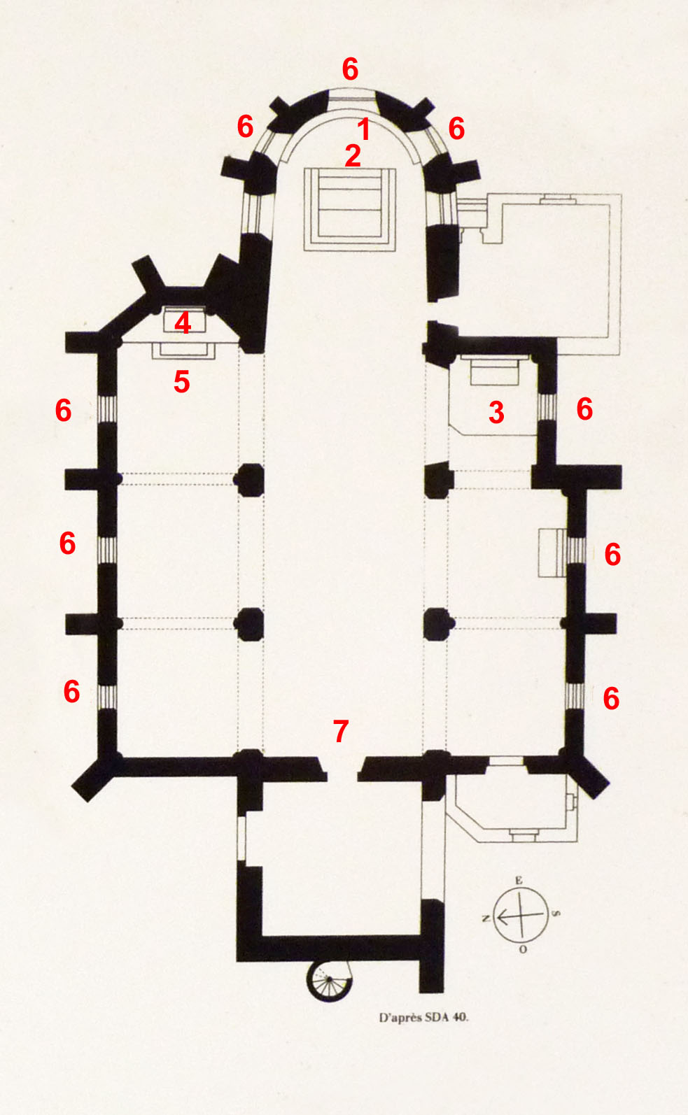 Plan de l'église Saint-Pierre de Montfort-en-Chalosse